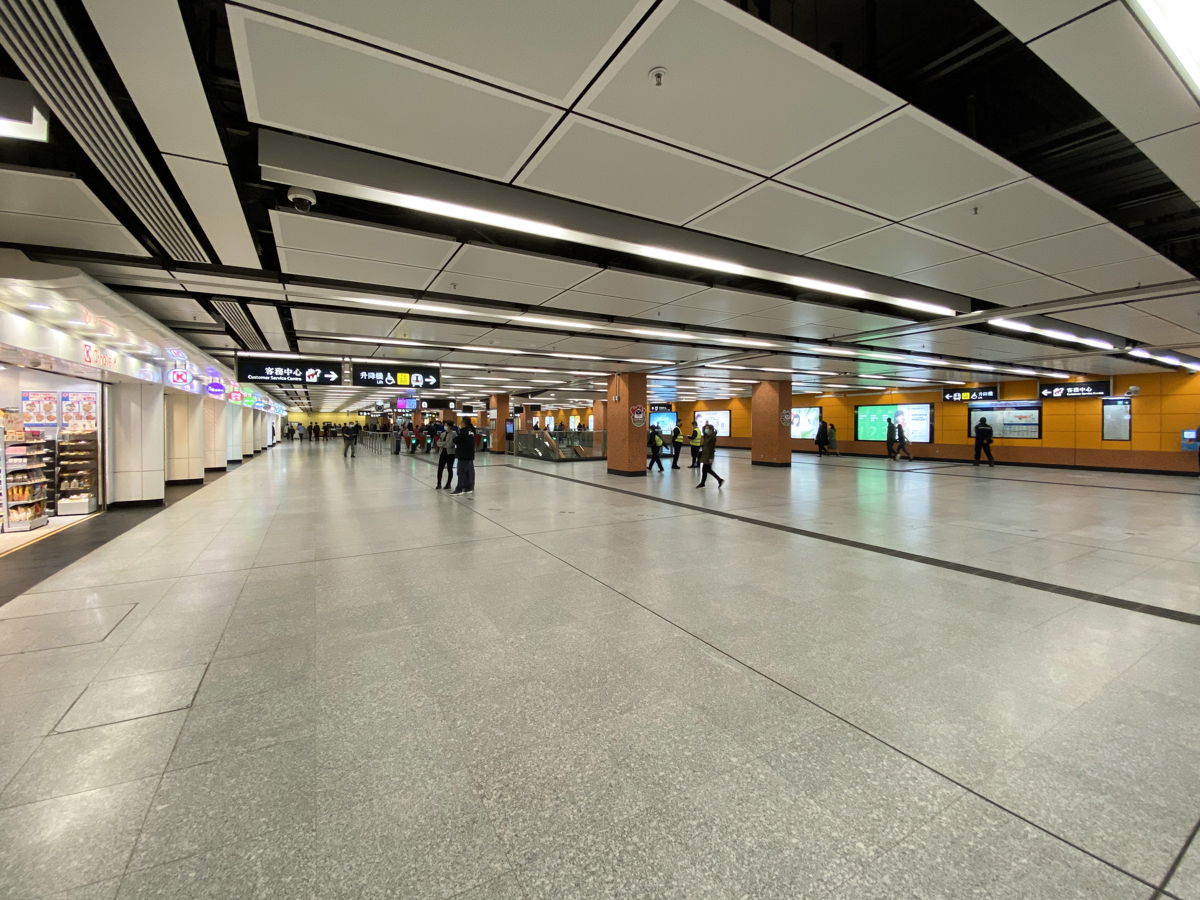 Kai Tak Station